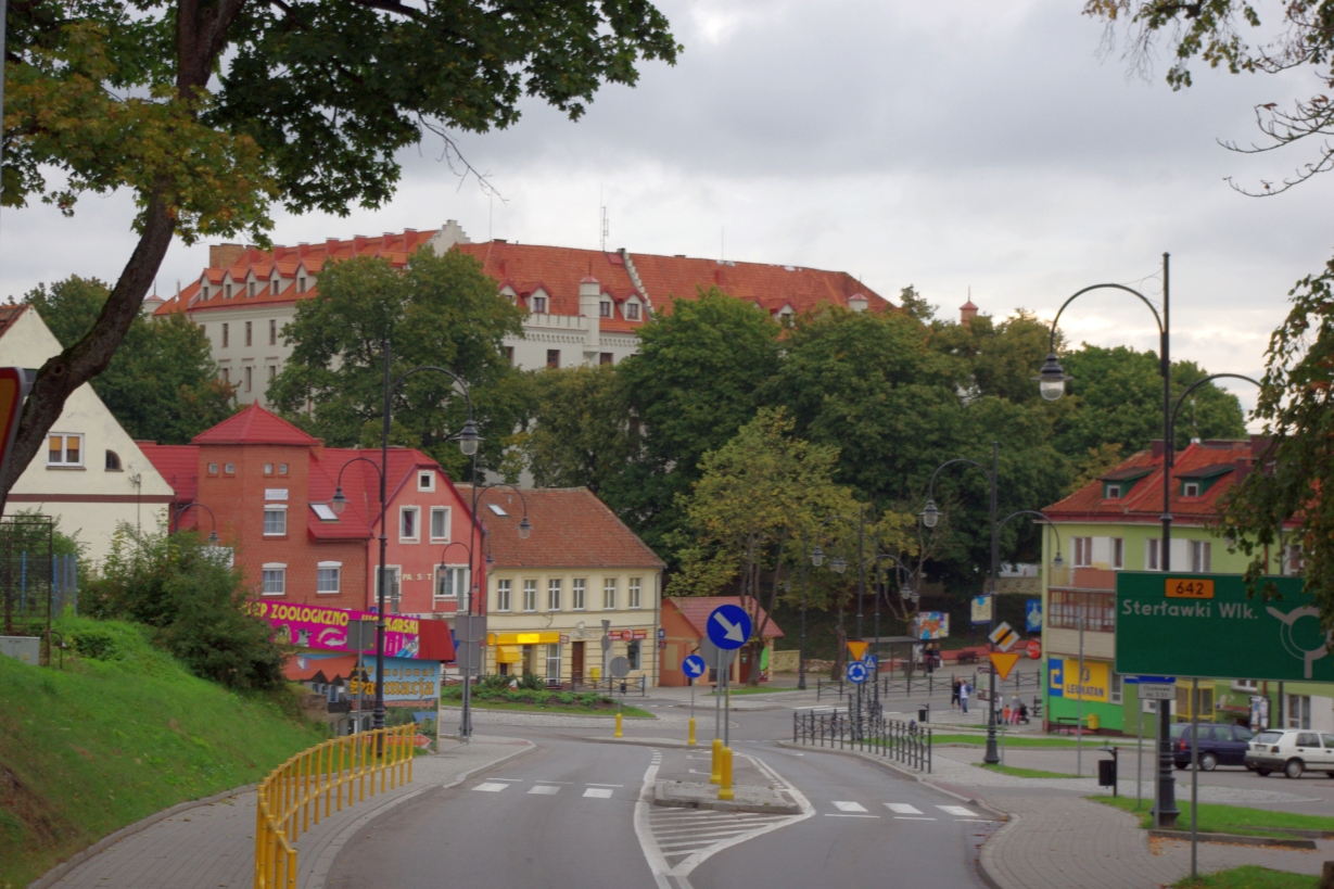 Zamek w Rynie